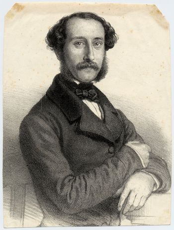 Stefano Golinelli in una litografia